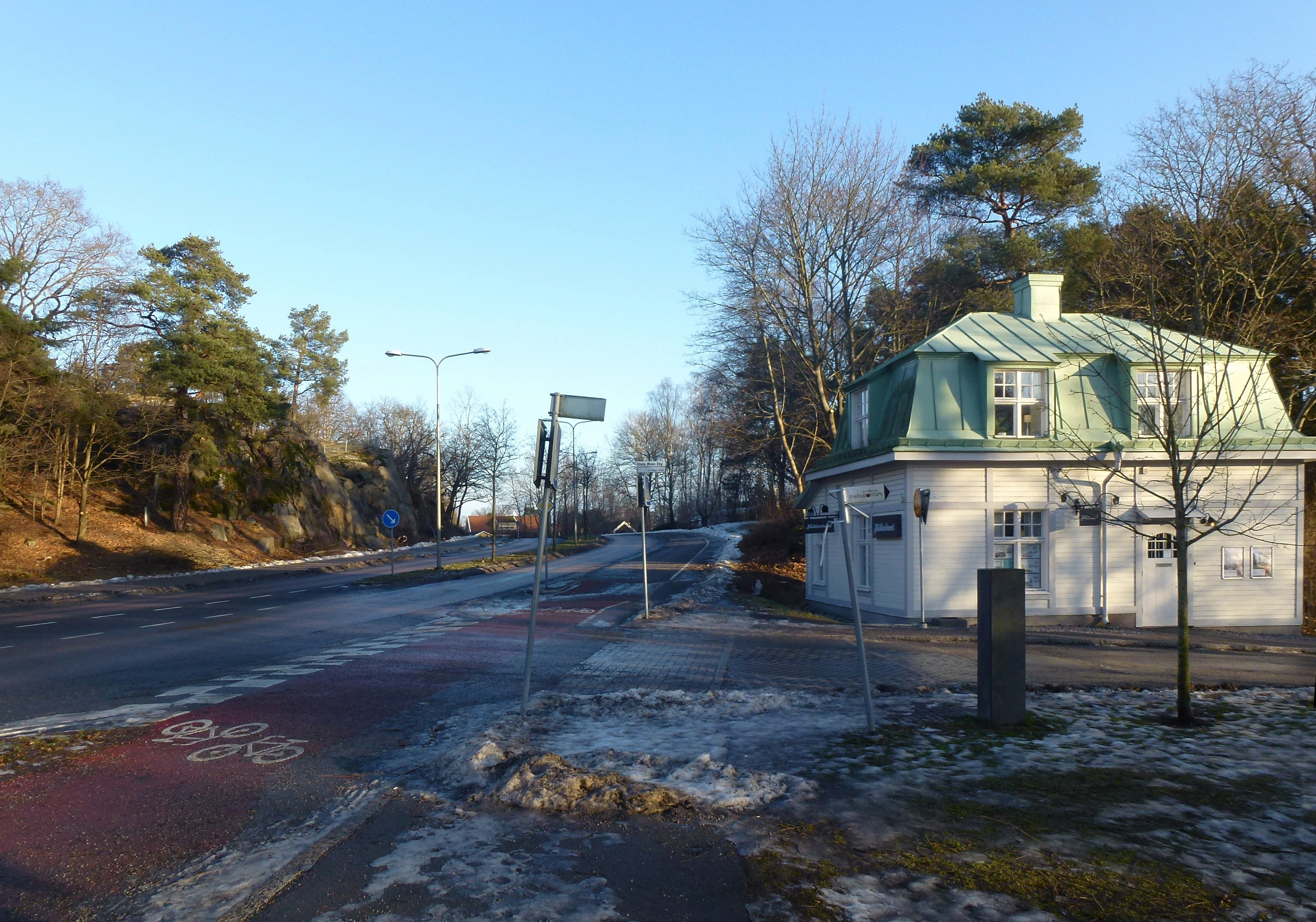 Mickelsbergsvägen vid Långbro grindstuga